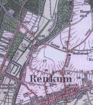 De Bergerhof (Renkum) en omgeving in 1898